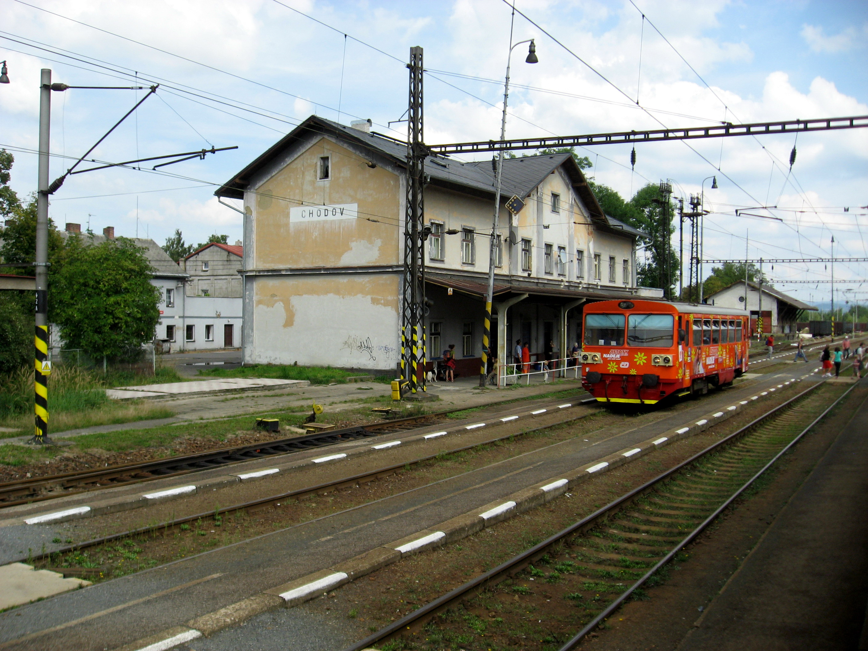 Chodov, železniční stanice